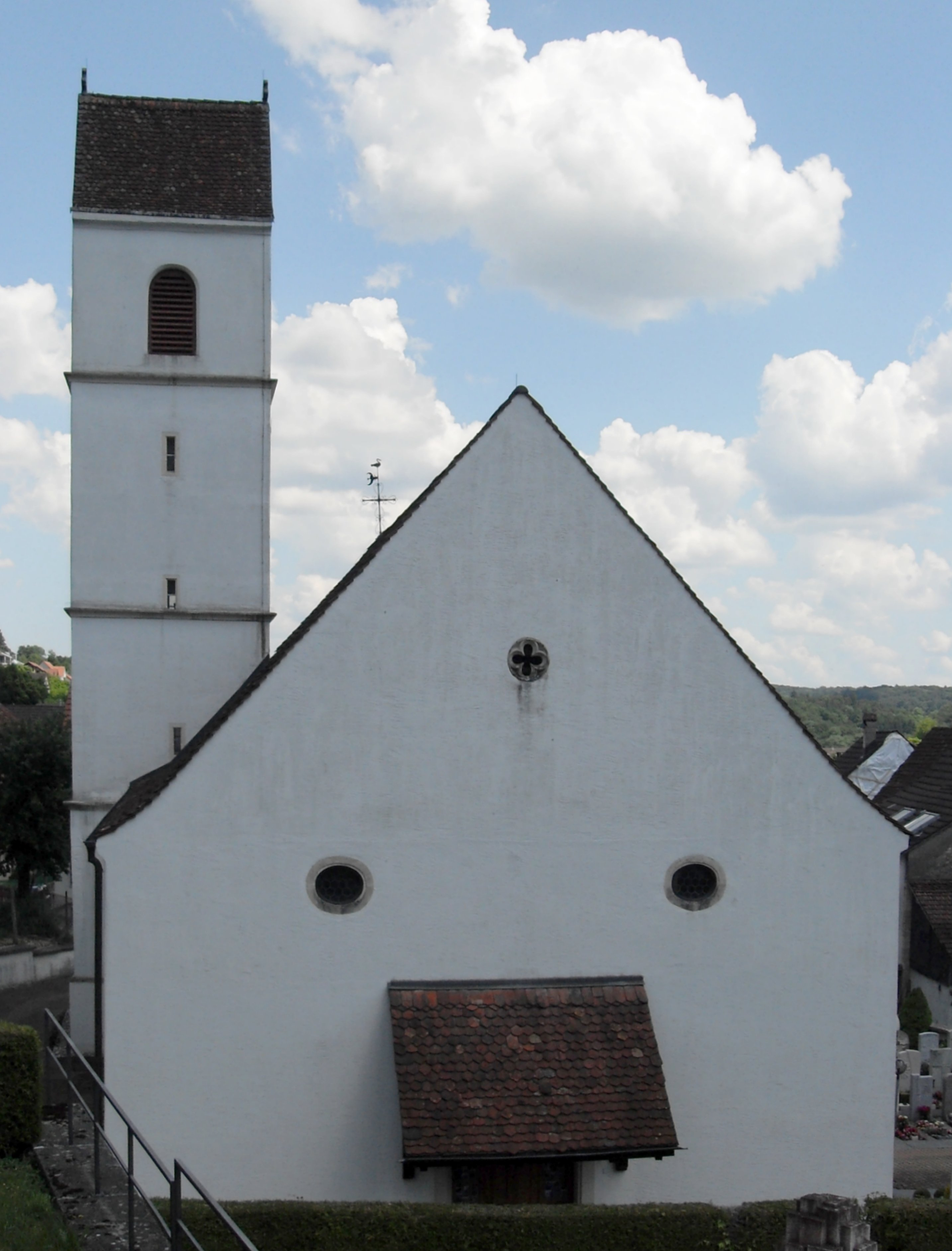 Kirche St. Martin in Büren, Kanton Solothurn, Schweiz